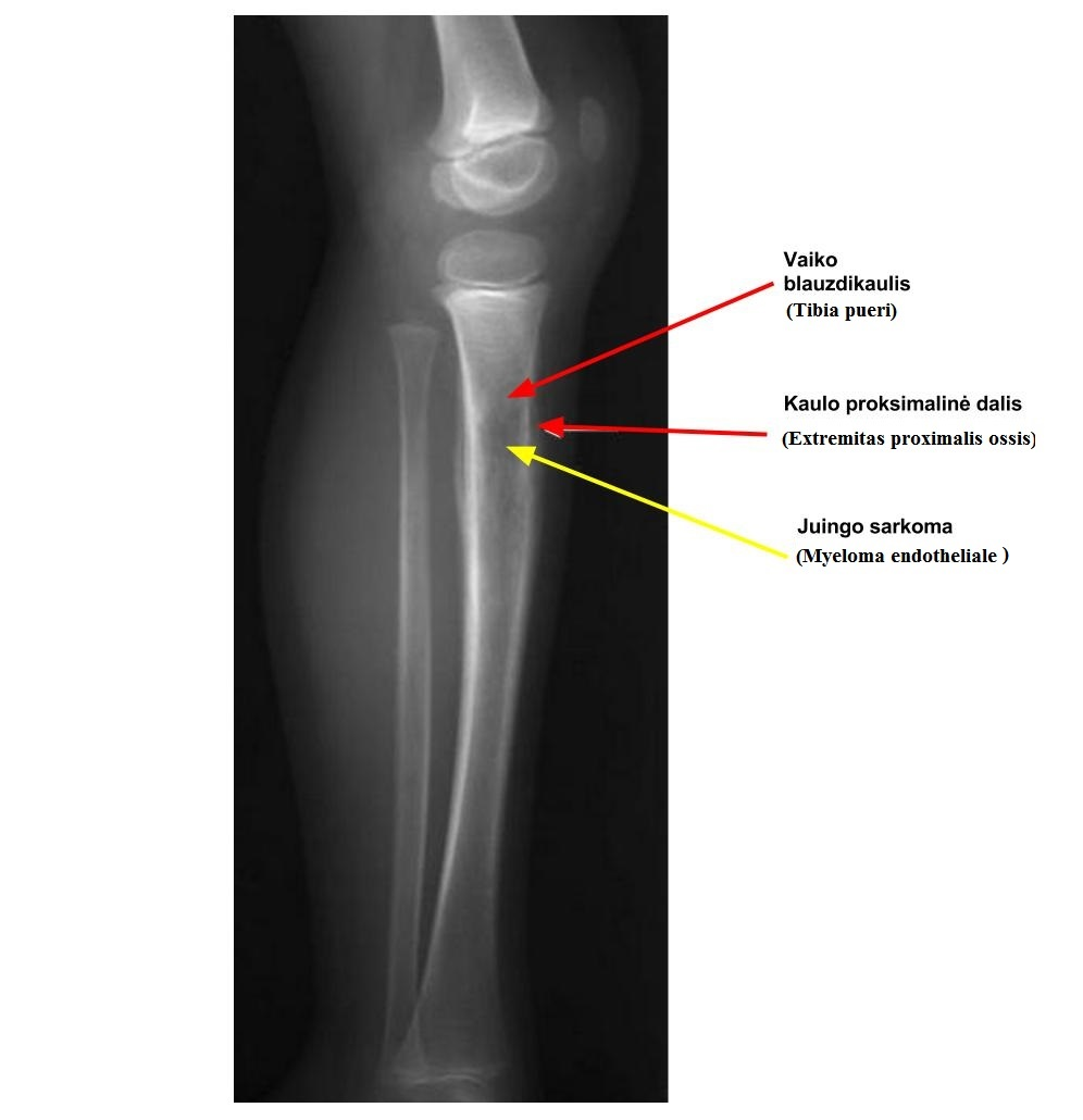 Juingo sarkomos, esančios paciento blauzdikaulyje, vaizdas.